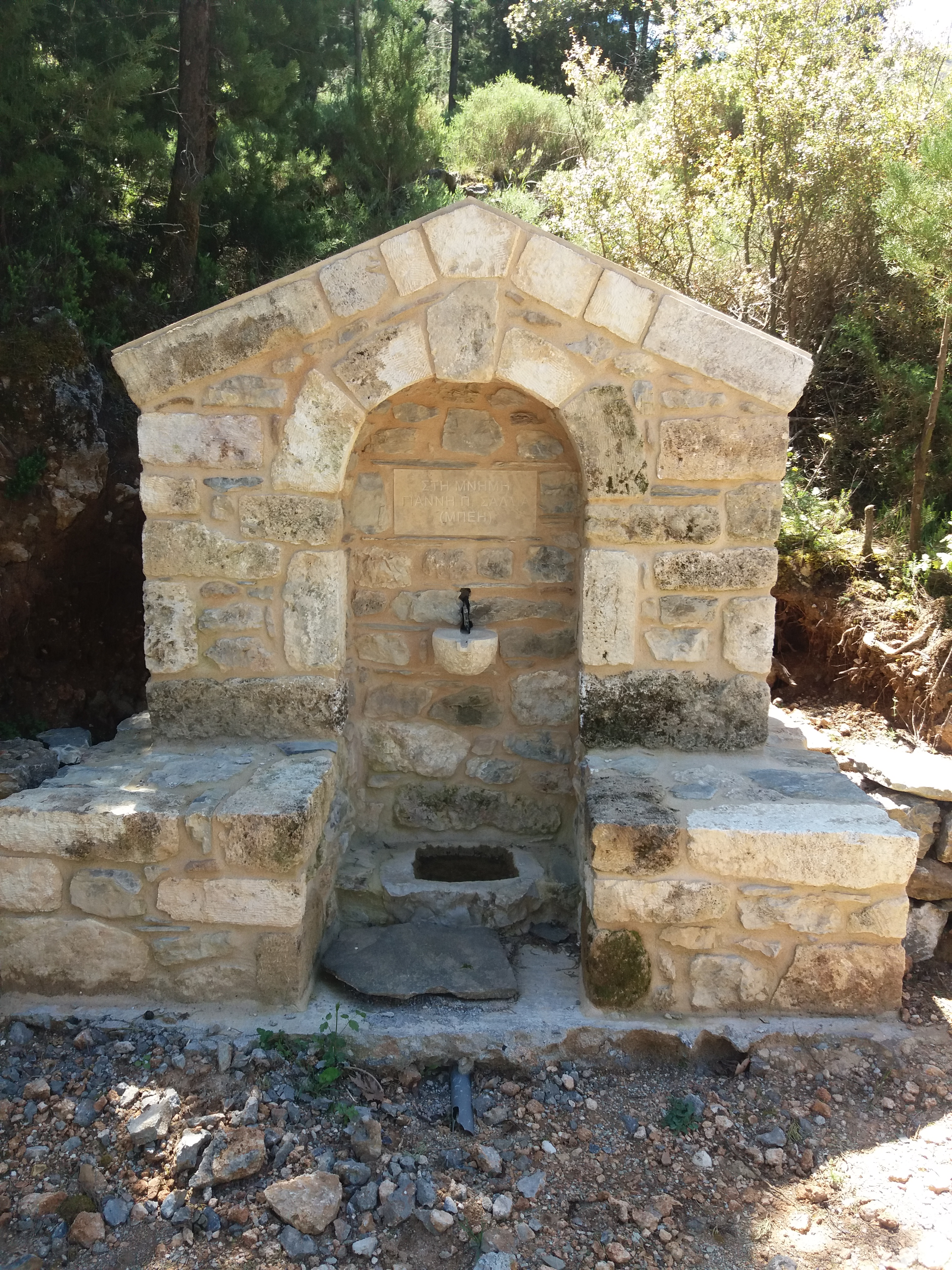 Κρήνη στον Μελέ της Αρτεμισίας Καλαμάτας This is a photography of Natura 2000 protected area with ID GR2550006